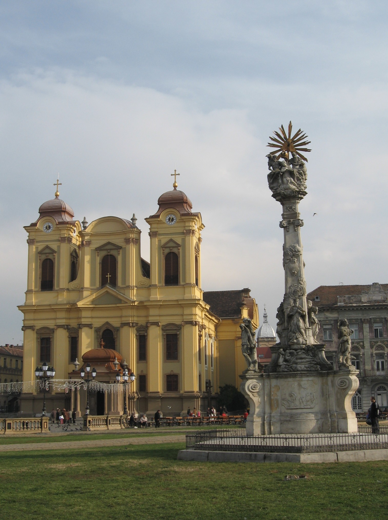 Pestsaeule und Dom zu Timisoara